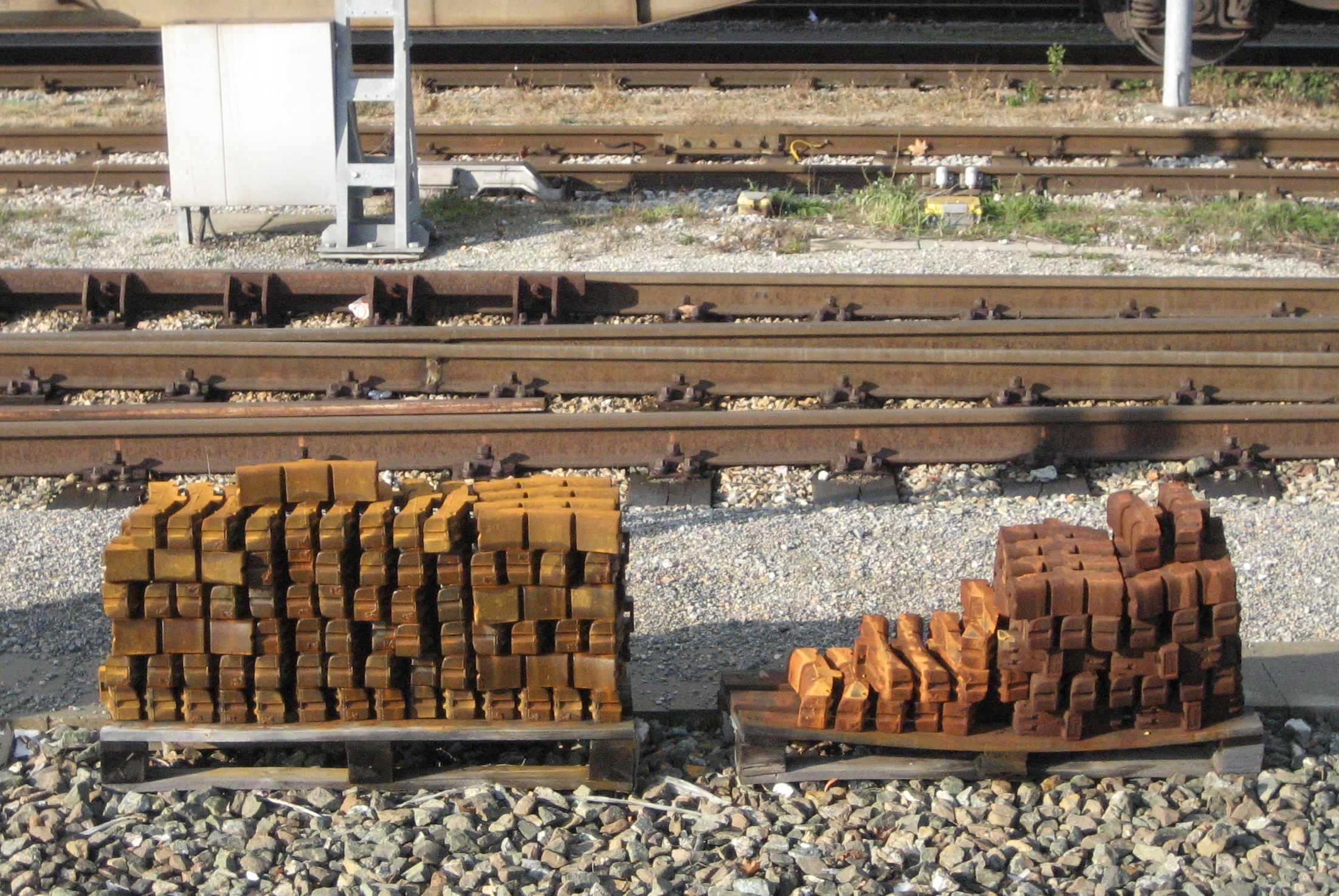 Bremssohlen aus Grauguss